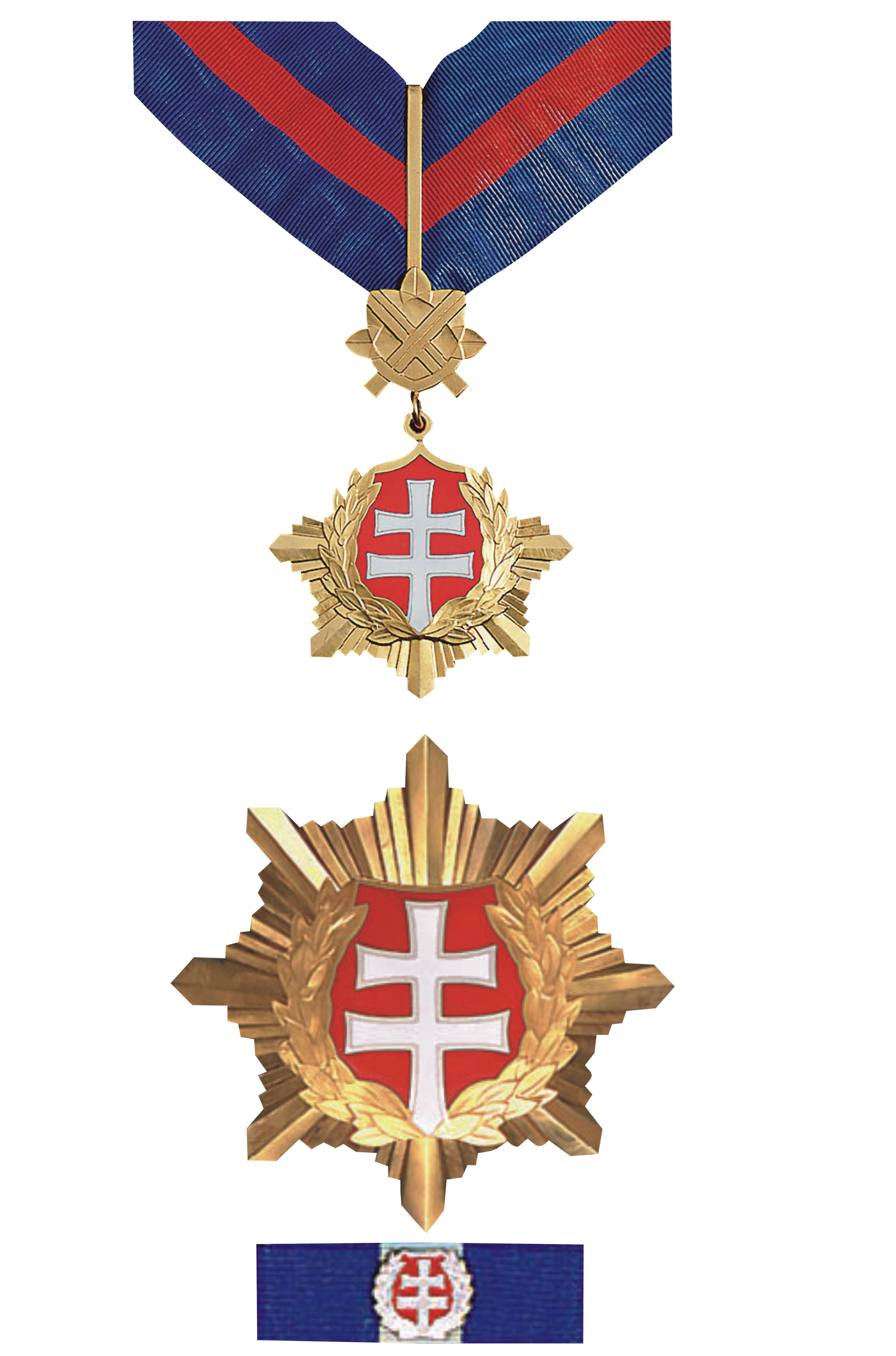 Rad bieleho dvojkríža 2. triedy vojenského druhu. Insígnie vojenského druhu II. triedy radu tvorí: radový kríž s náhrdelníkovou stuhou, radová hviezda, radová stužka a radová rozeta. Radový kríž má priemer 60 mm, je razený zo striebra, pozlátený. Náhrdelníková stuha je hodvábna, modro-červeno-modrá, s pomerom farieb 3/8:2/8:3/8, dlhá 50 cm, široká 38 mm. Radová hviezda má priemer 80 mm, je razená zo striebra, pozlátená. Radová stužka na jej miniatúre je strieborný olivový veniec.